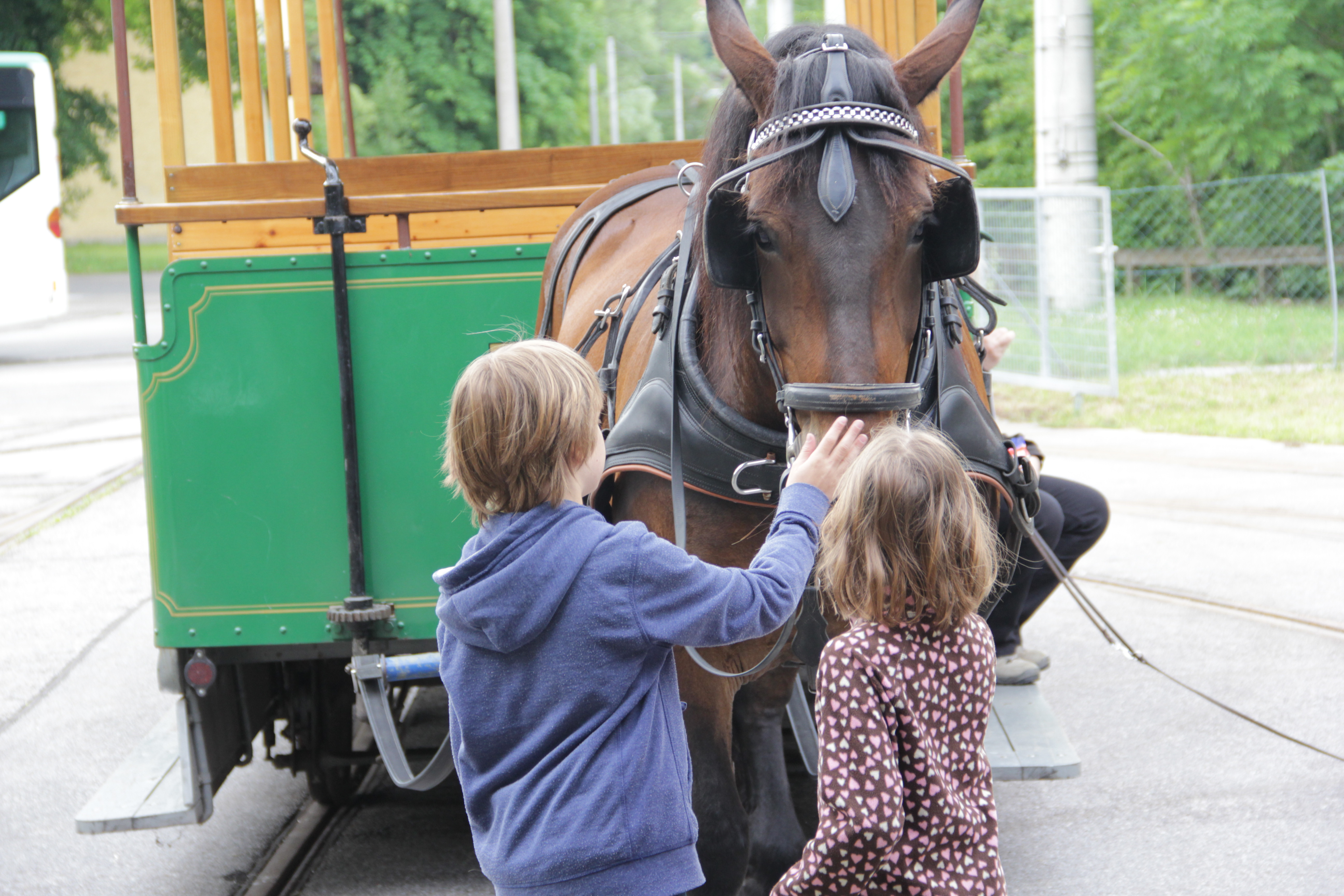 (c) Kevin Griebaum